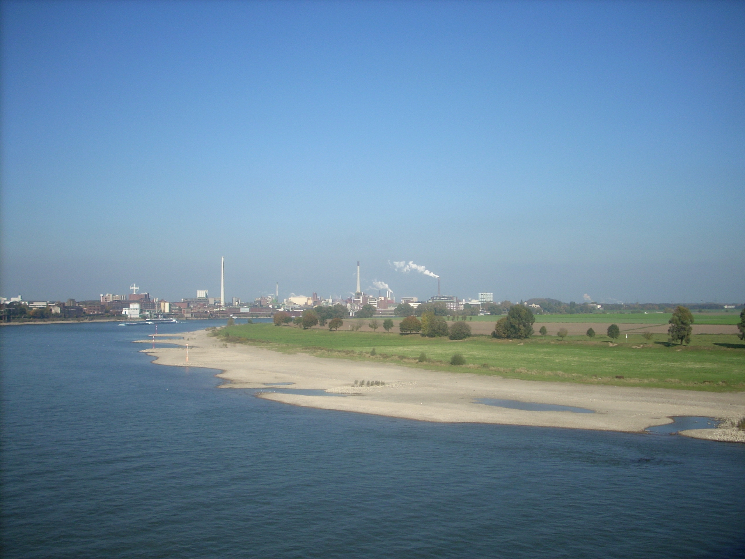 Blick rheinabwärts in Höhe Duisburg-Mündelheim, im Hintergrund die Bayer-Werke Uerdingen